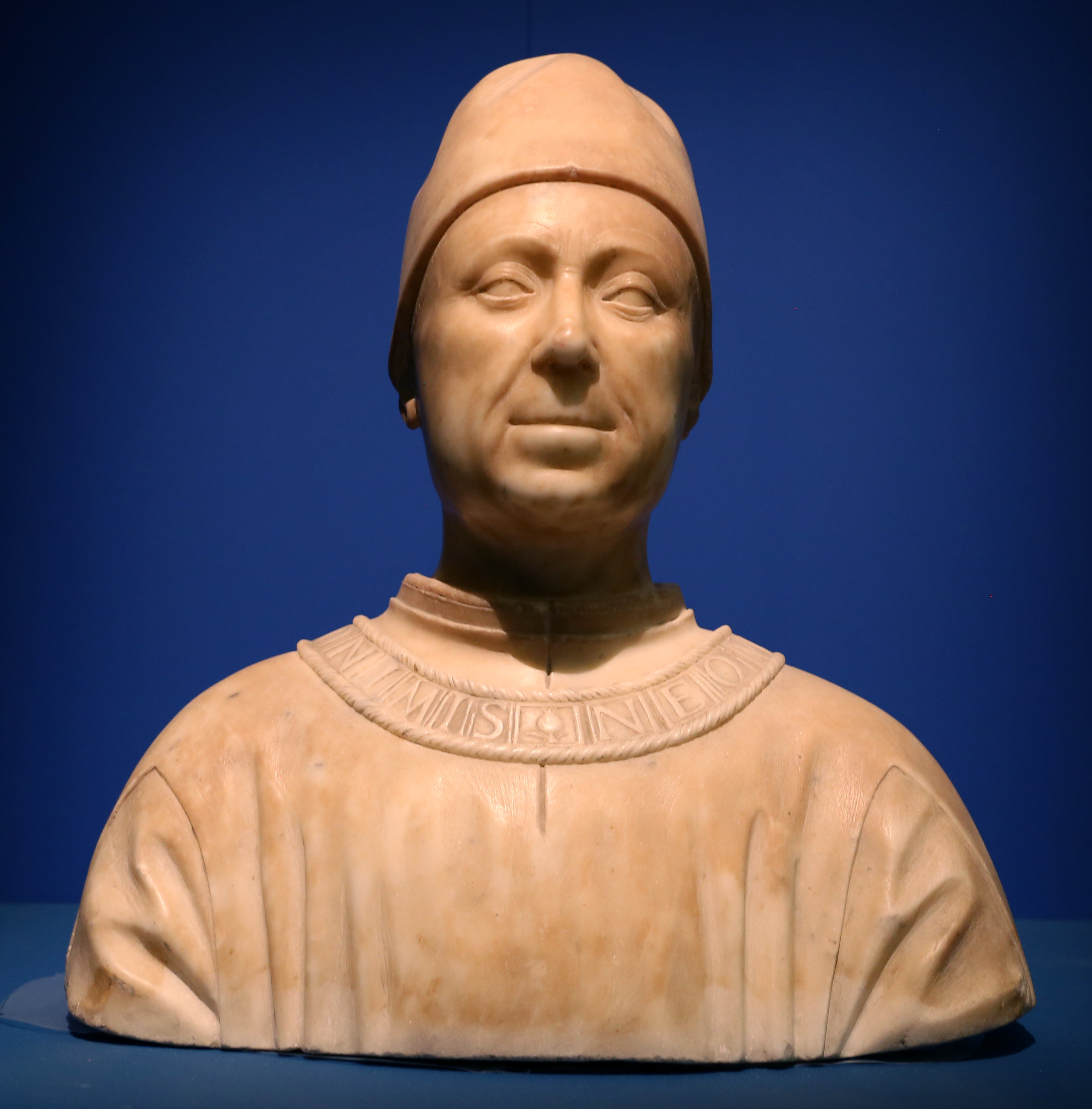 Palazzo Lanfranchi This is a photo of a monument which is part of cultural heritage of Italy.